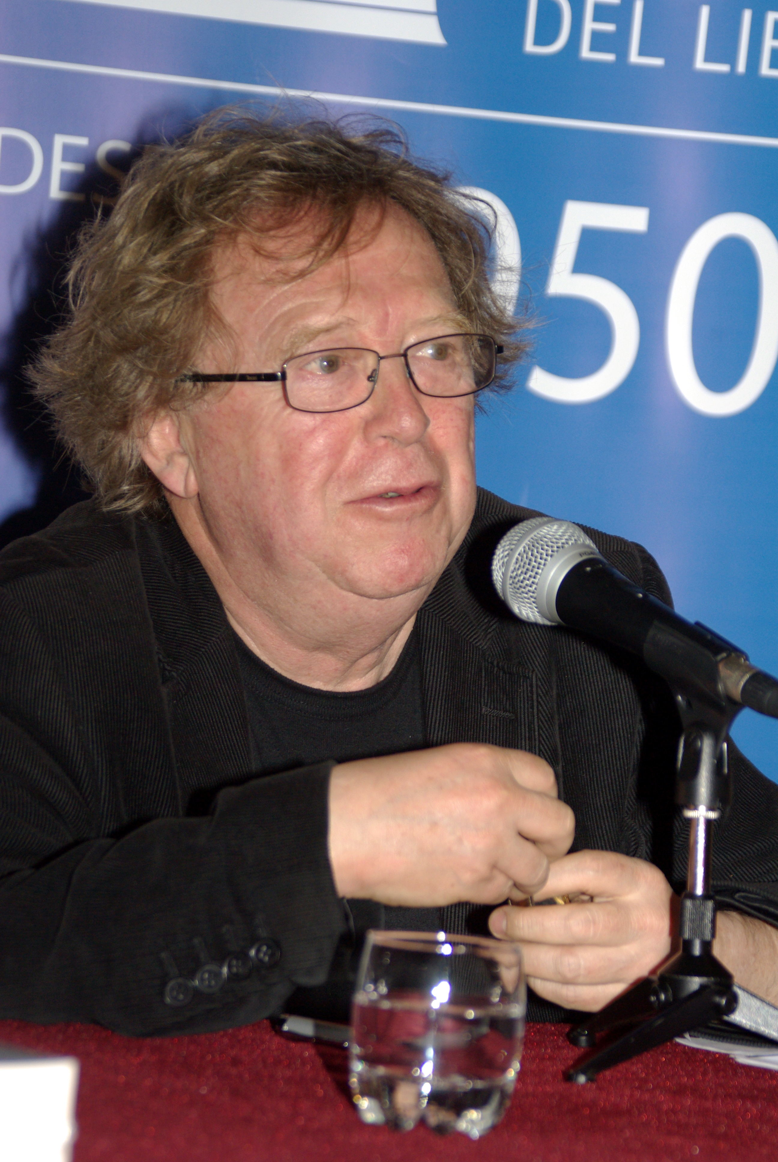 El poeta chileno Juan Cameron en una velada de homenaje a Gonzalo Rojas celebrada en el Museo Histórico Nacional en el marco de la Fiesta del Libro de la Plaza de Armas de Santiago, abril 2013